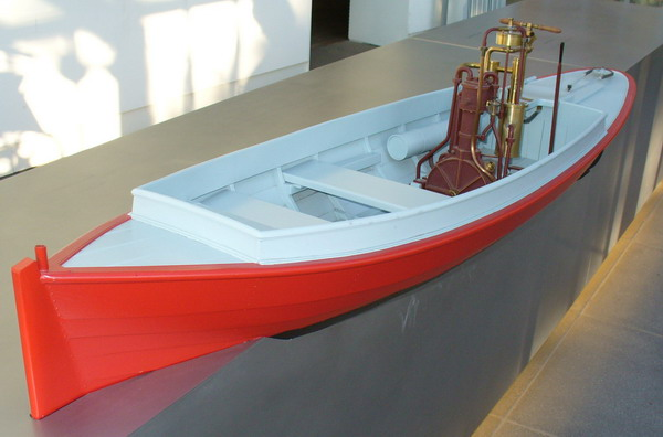 Stuttgart-Bad Cannstatt Werkstatt Gottlieb Daimler: Modell Boot Neckar 1886